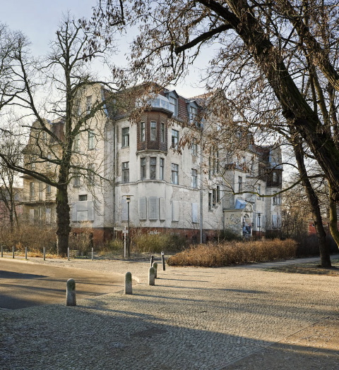 Berlin-Pankow, Parksanatorium. Ansicht vor Sanierung, 2012.